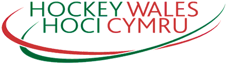 Logo des Walisischen Hockeyverbandes